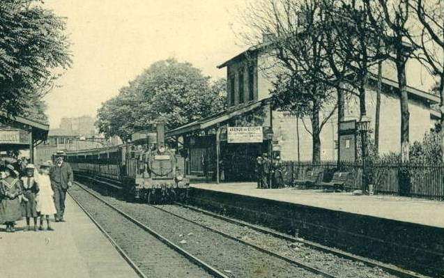 Gare de l'Avenue de Clichy (Paris 17e) - Petite Ceinture